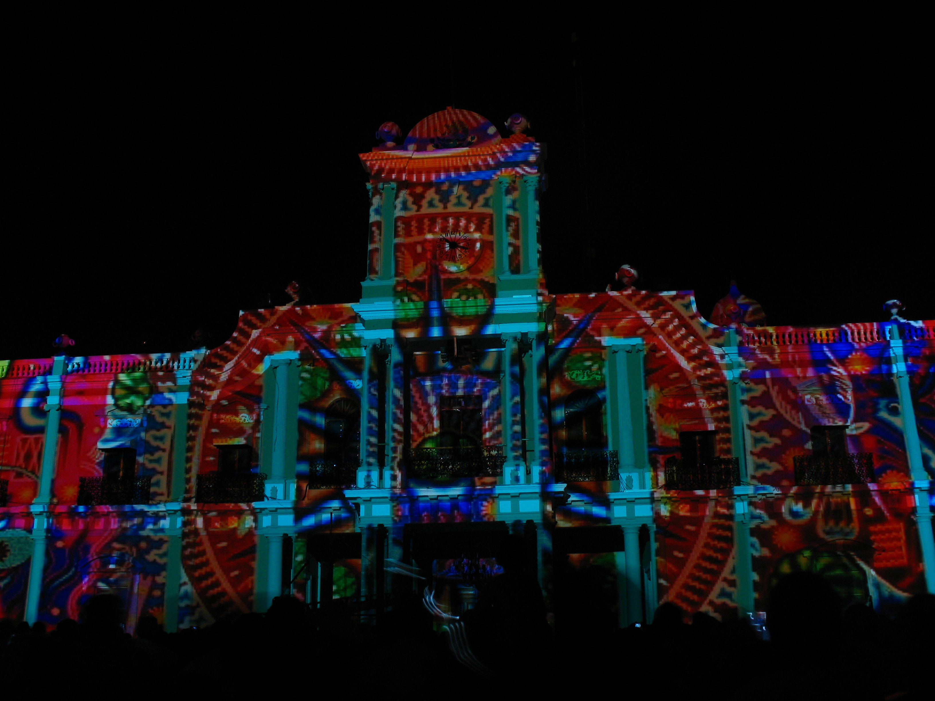 Grito de independencia, festejando el bicentenario del inicio de la independencia de México en Tepic, Nayarit